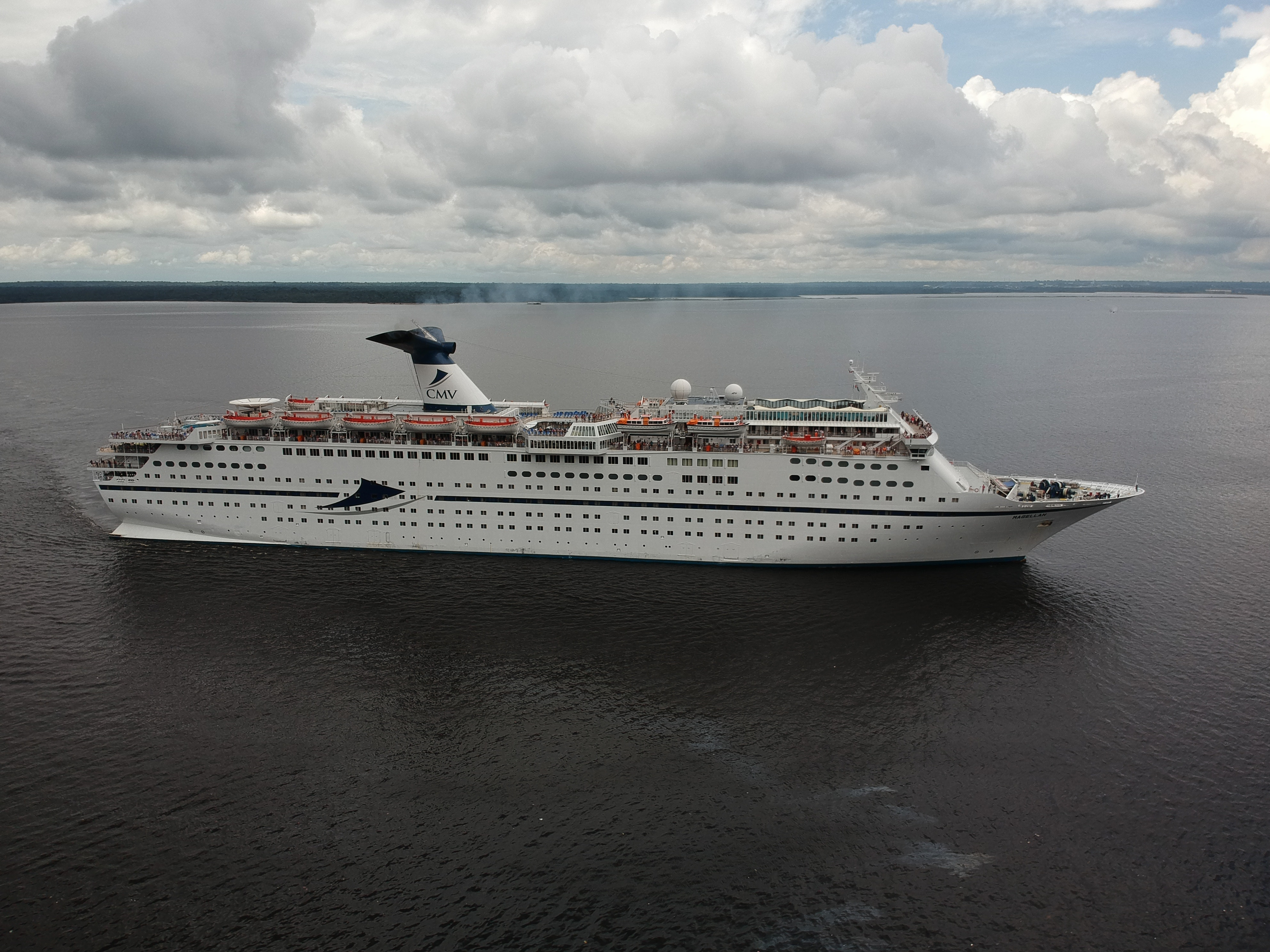 Navio cruzeiro no rio Negro a caminho da cidade de Manaus.